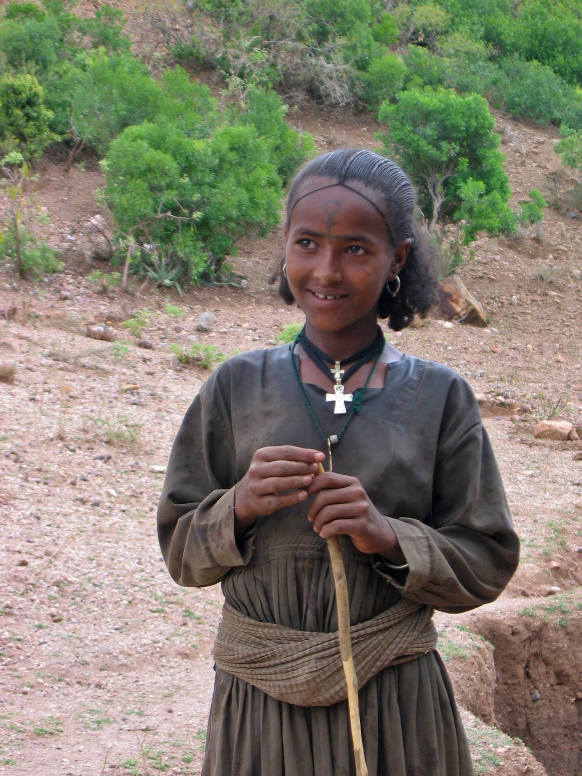 Photo Credit: S. Kalscheur/USAID.